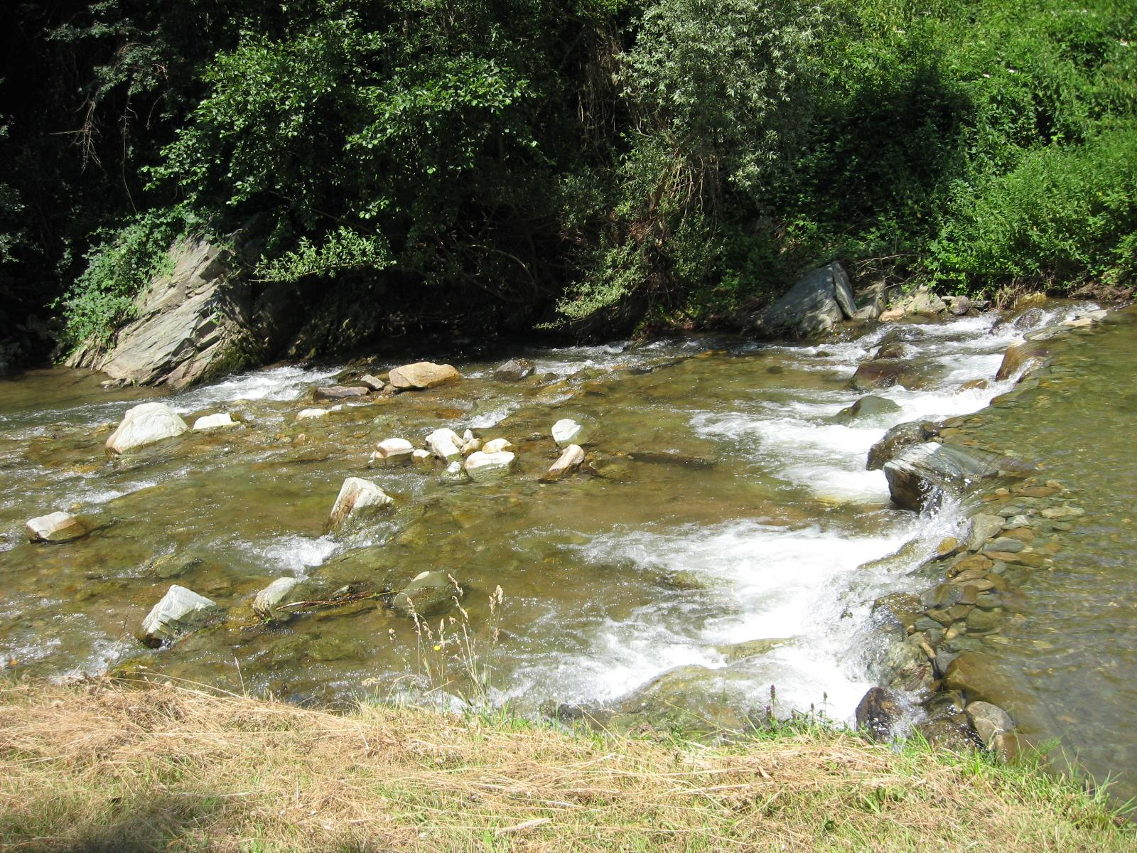 Sopstvena slika sela Dadince Kozaracka reka Dragan Cvetkovic juli 2010 Licensing